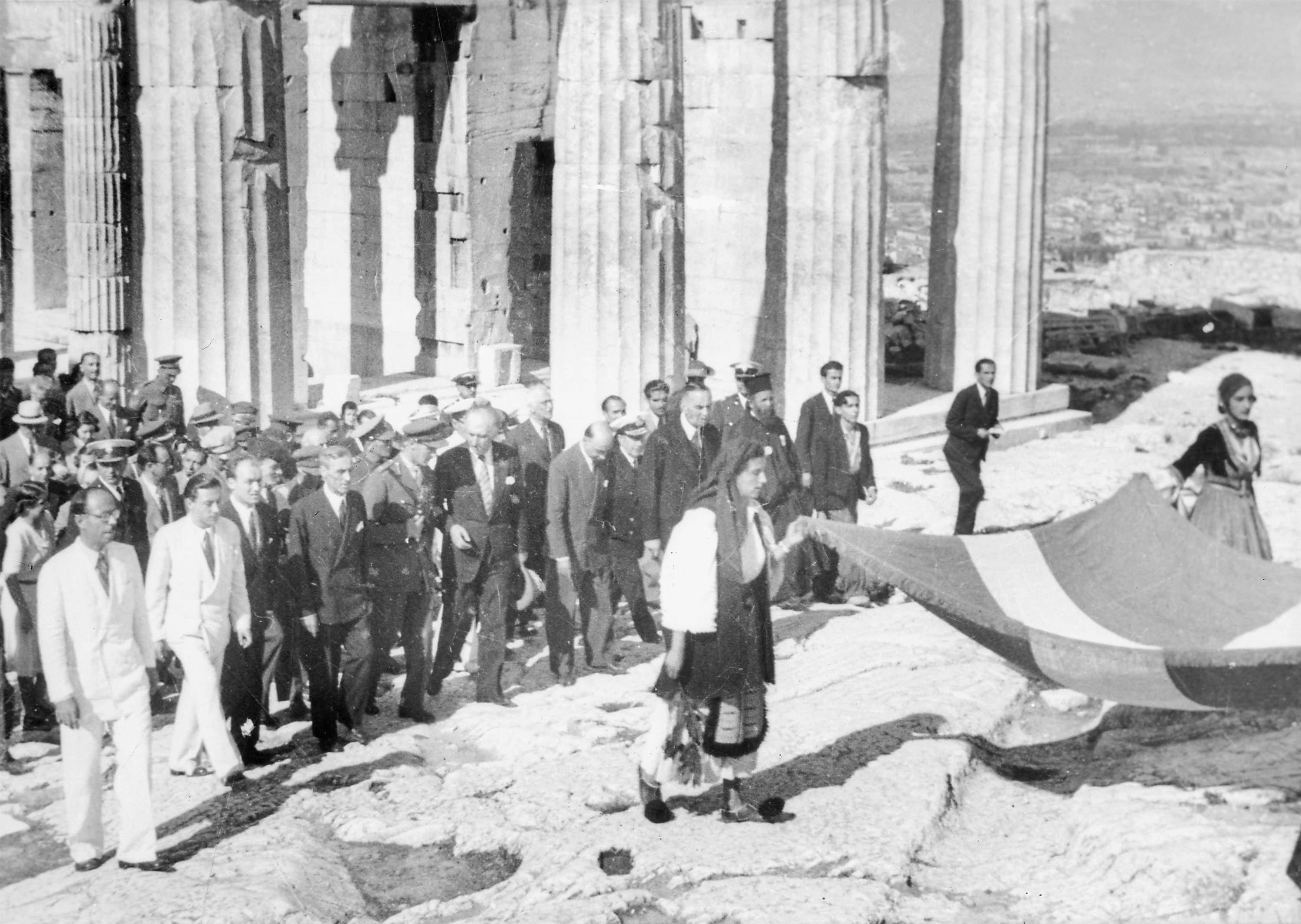 Εκδήλωση και έκθεση στο ΥΠΕΞ για τα 70 χρόνια από την κήρυξη πολέμου εναντίον της χώρας μας από τις δυνάμεις του άξονα Event and exhibition at the Foreign Ministry marking the 70th anniversary of the Axis powers’ declaration of war on Greece